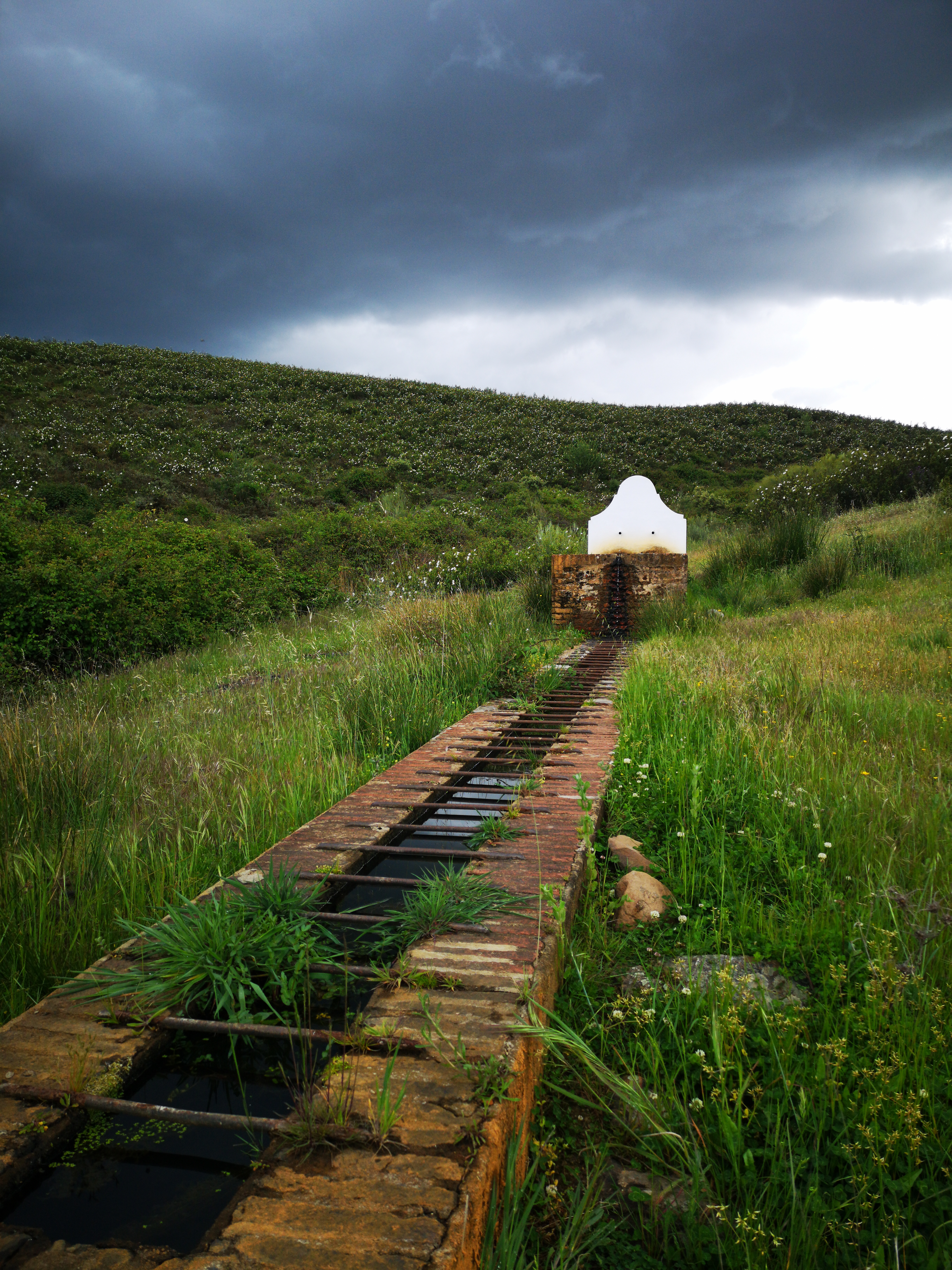 Fuente del Pilar de San Pedro, la Contienda. Encinasola. Rica por sus aguas con alto contenido en hierro. Debe de beberse con cuidado.